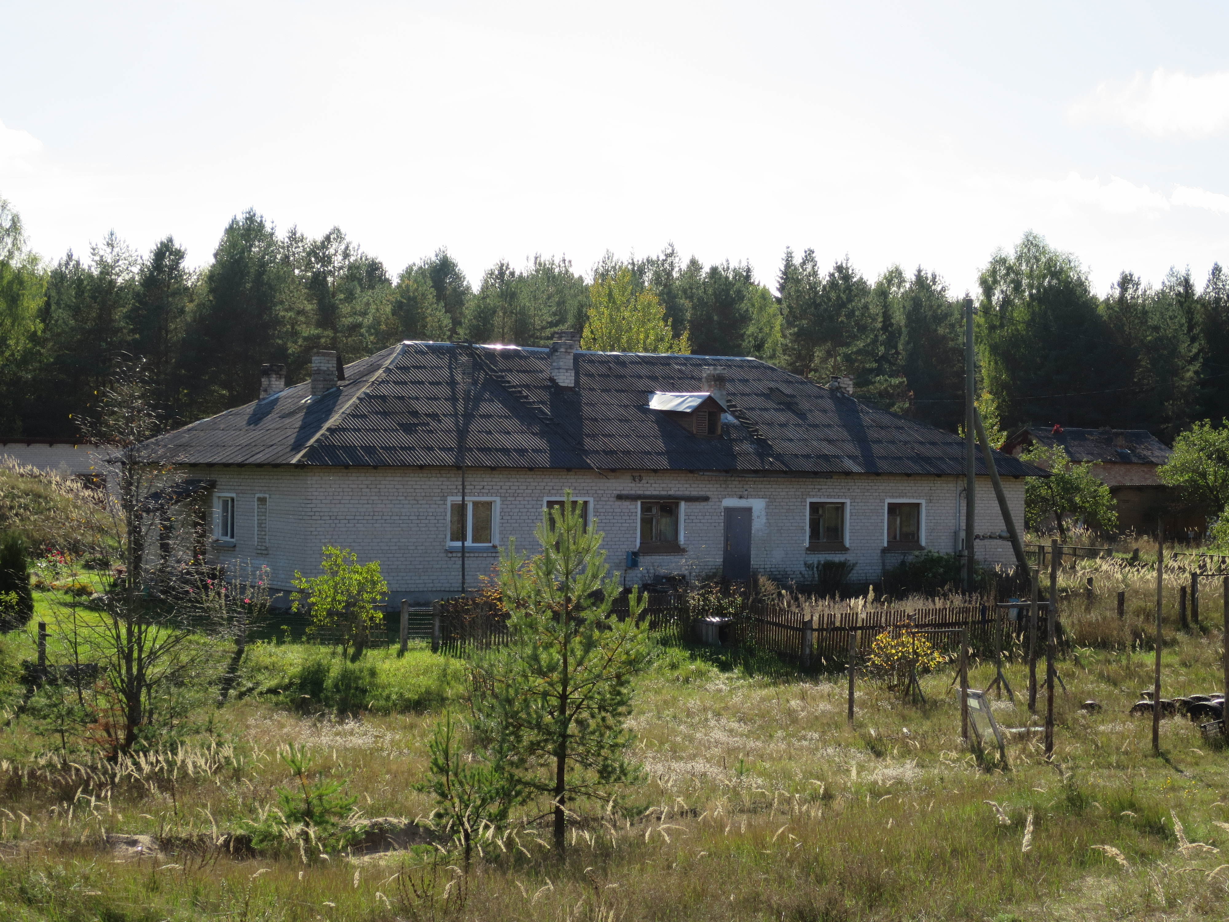 Ļubestes stacijas ēka